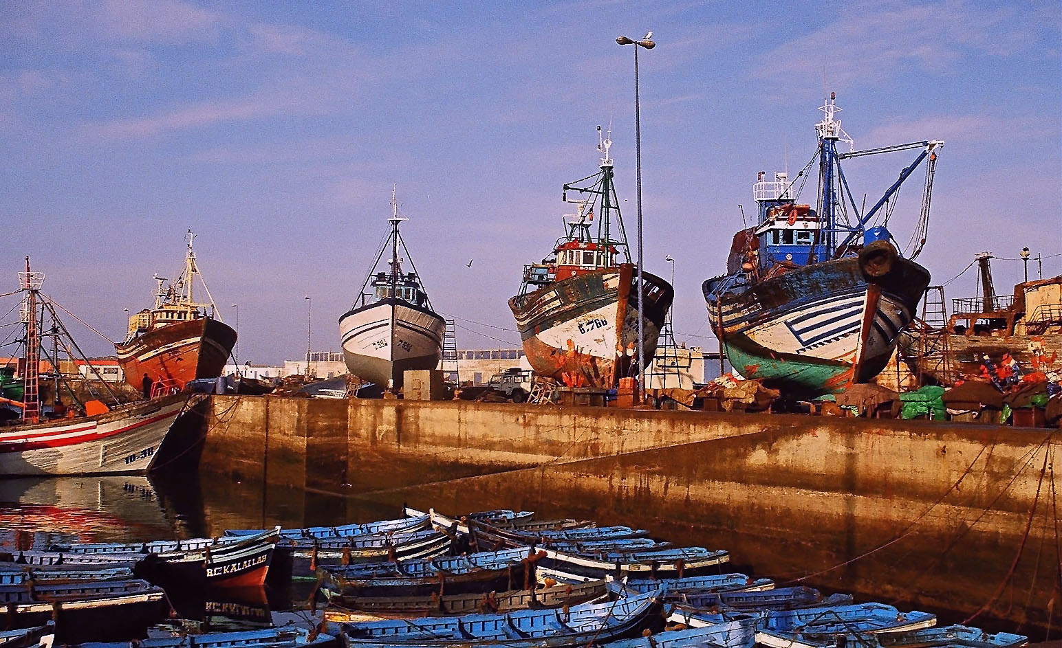 Port of Essaouira, Morocco